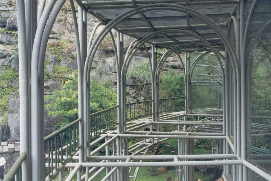 Ópera de Arame (ala externa).